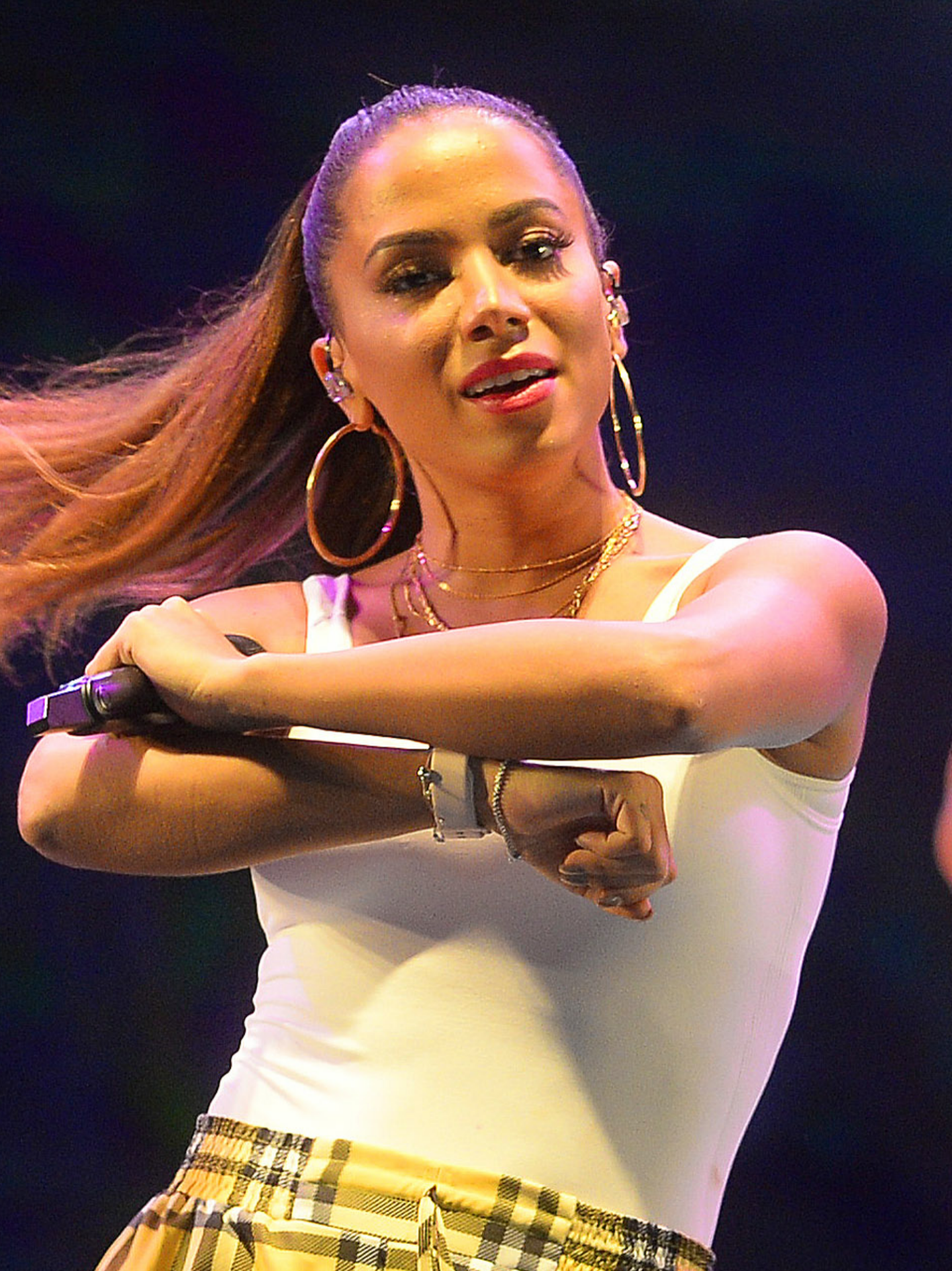 A capital comemora o seu 59º aniversário com shows de ritmos variados na Esplanada dos Ministérios na noite deste domingo (21/04). Fotos: Joel Rodrigues/ Agência Brasilia